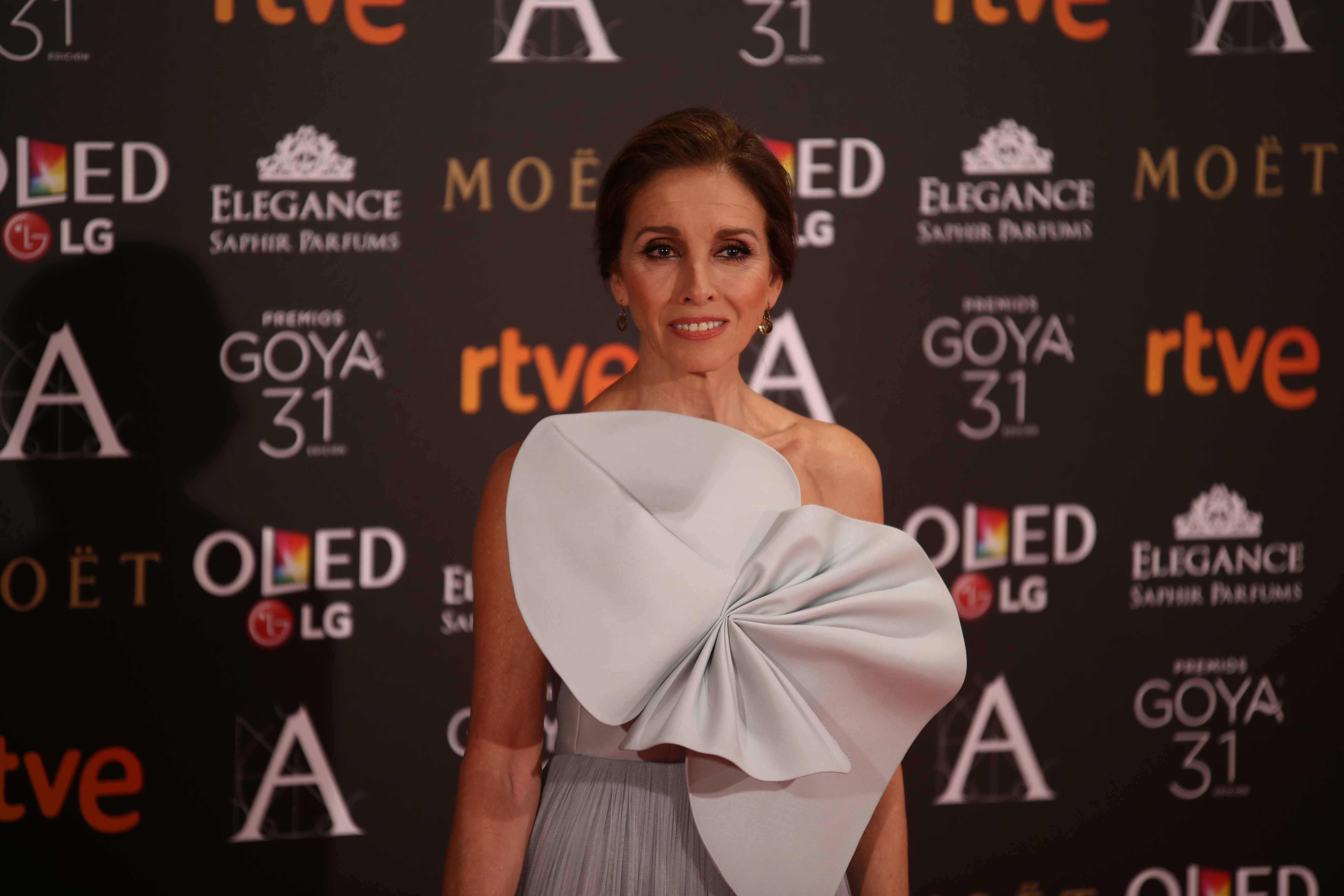 Premios Goya 2017